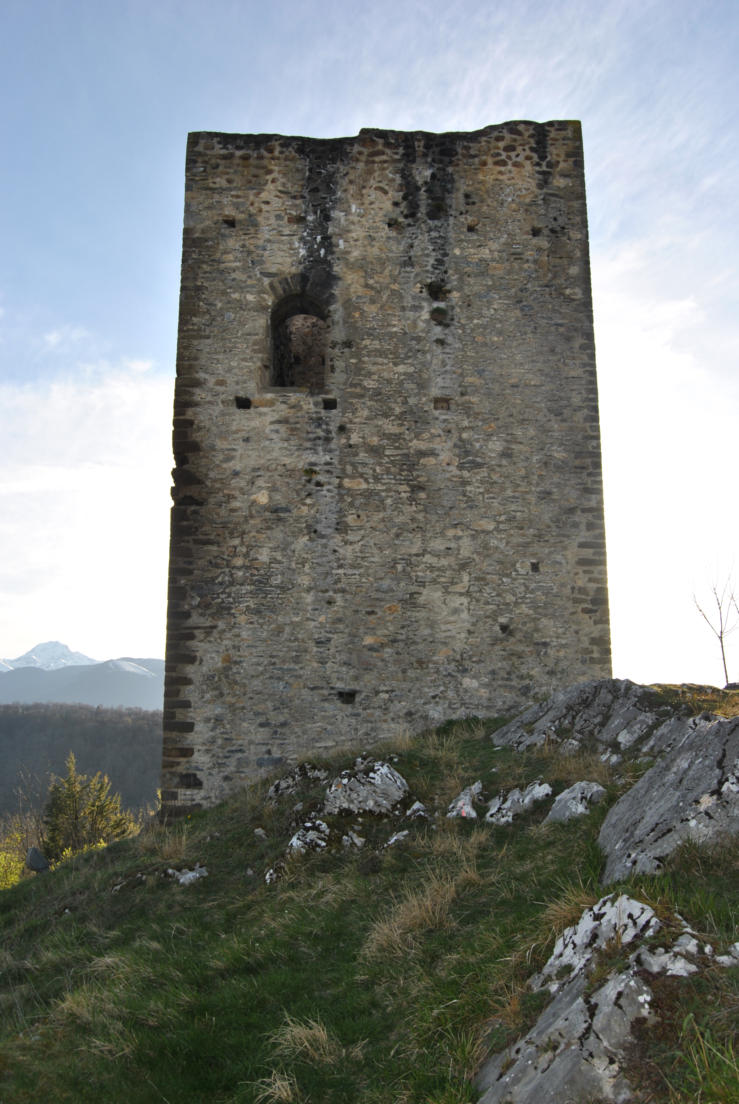 Tour d'Avezac (commune d'Avezac-Prat-Lahitte / 65130).